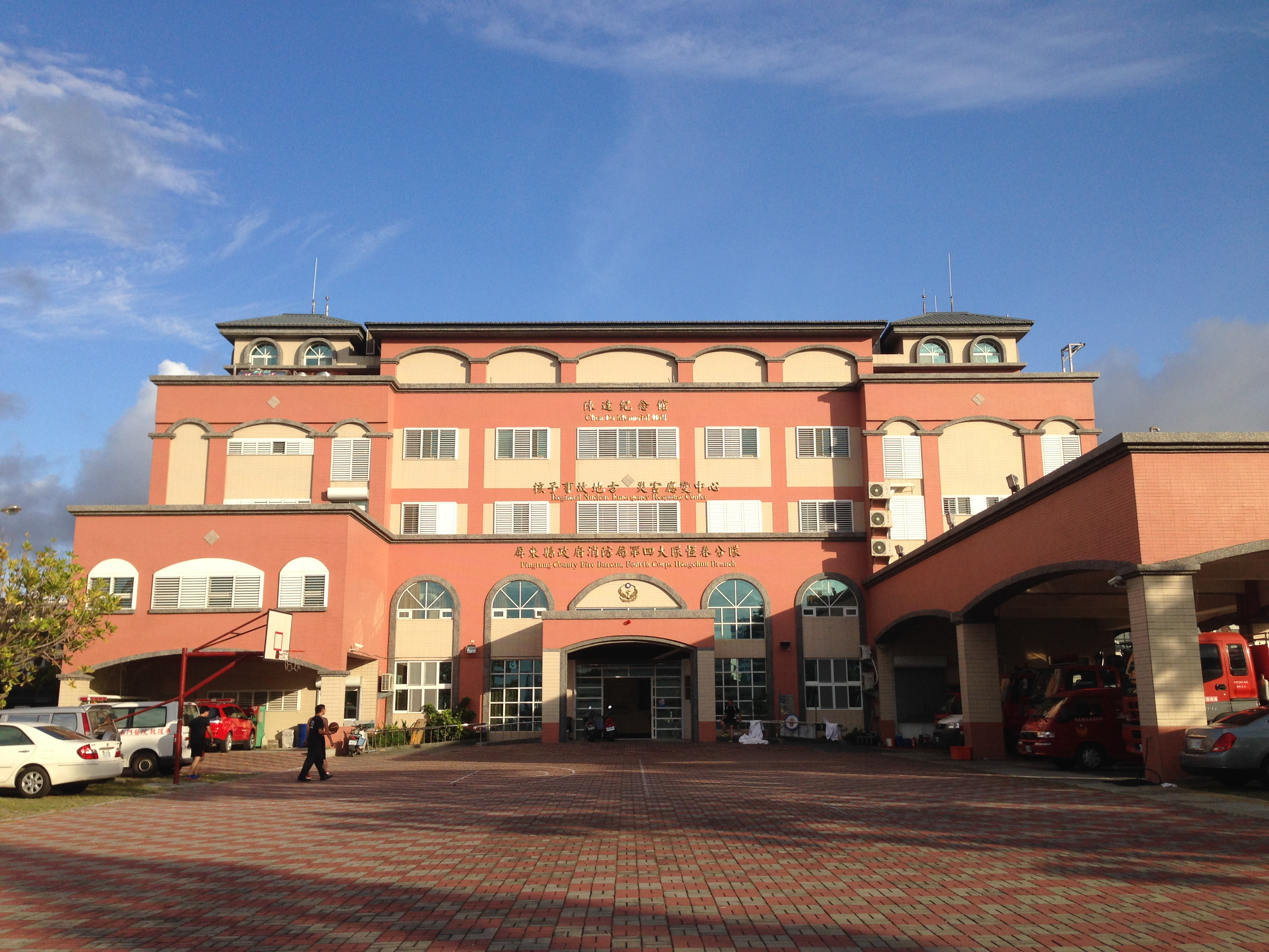 中文（台灣）: 陳達紀念館